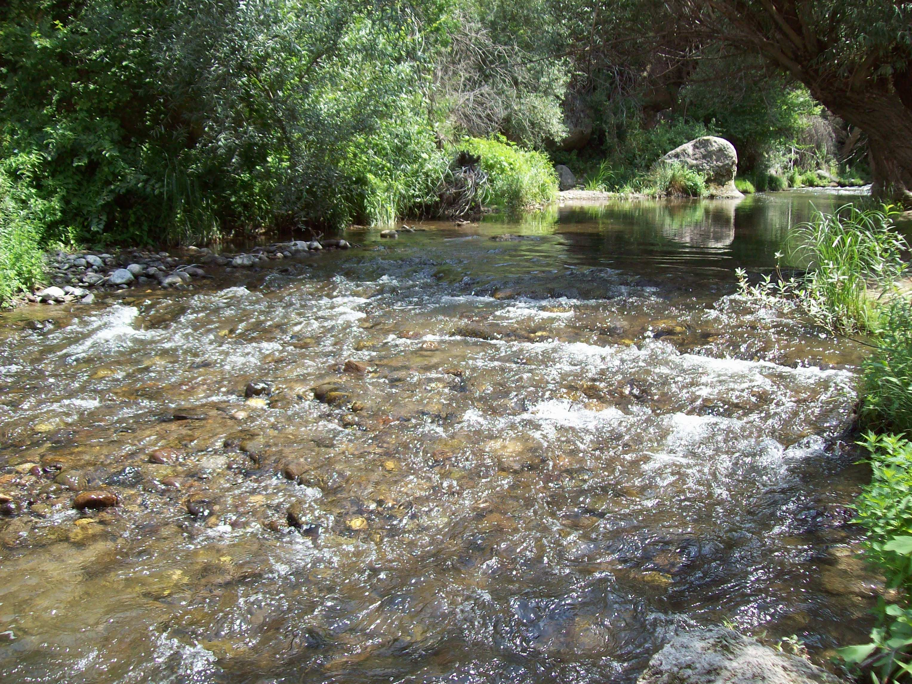 Türkçe